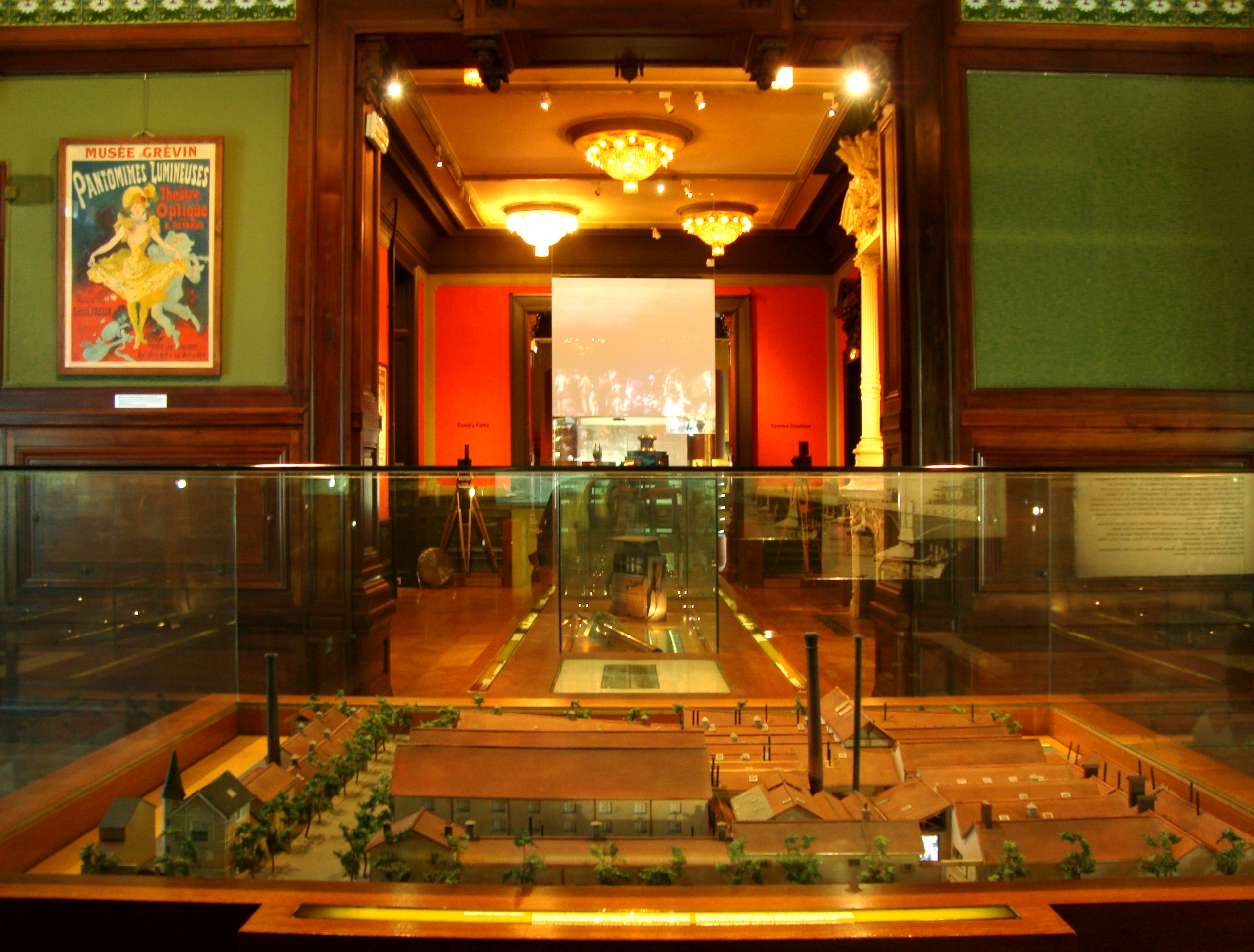 Une salle du musée de l'Institut Lumière à Lyon. Au premier plan, une maquette de l'usine des frères Lumière.